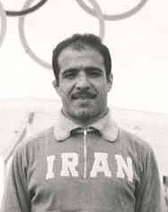 Mohammad Ali Khojastehpour